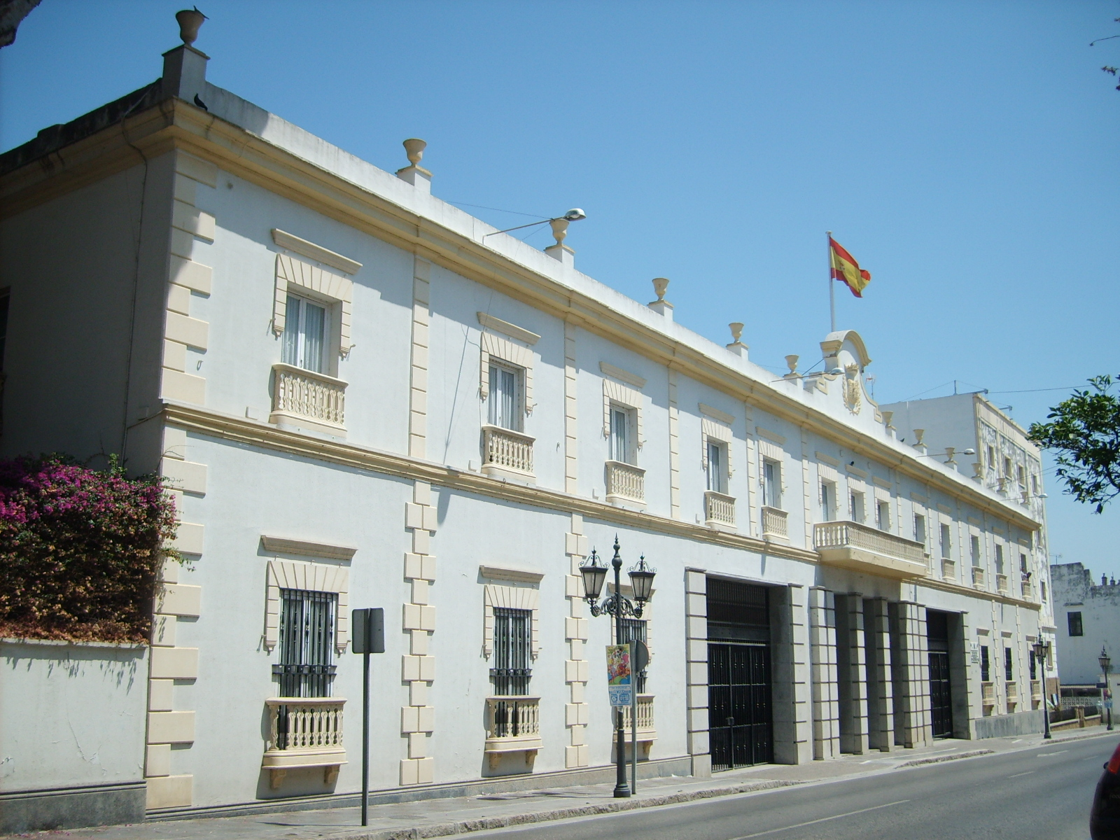 Portada del edificio de la Antigua Capitanía General, en San Fernando (Cádiz [Andalucía]).